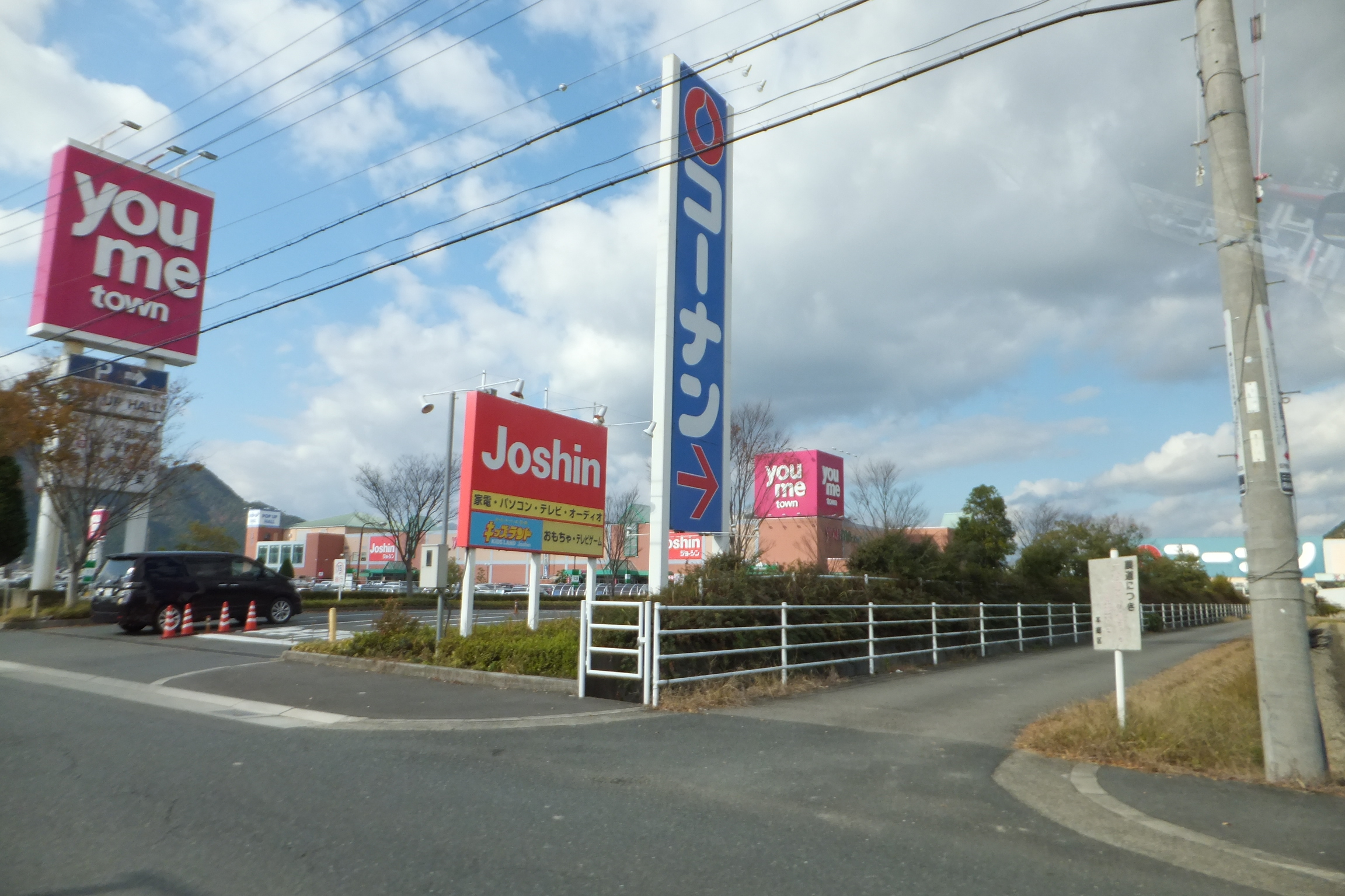 ゆめタウン氷上